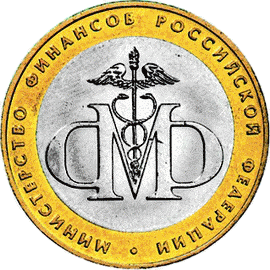 Юбилейная монета. 2002г. 10руб. Министерство финансов Российской Федерации. Реверс.